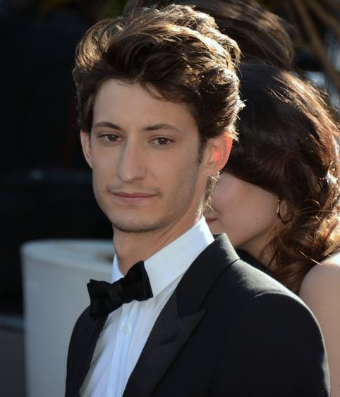 Pierre Niney au festival de Cannes